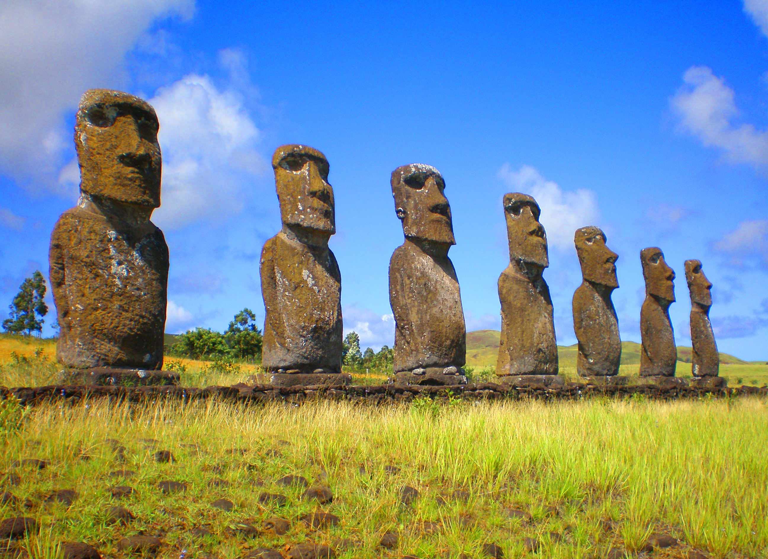 Ahu Akivi